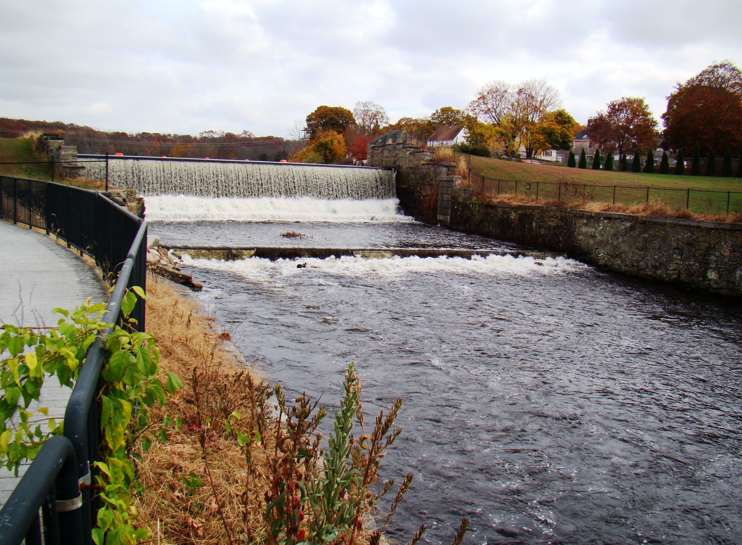 Millrace